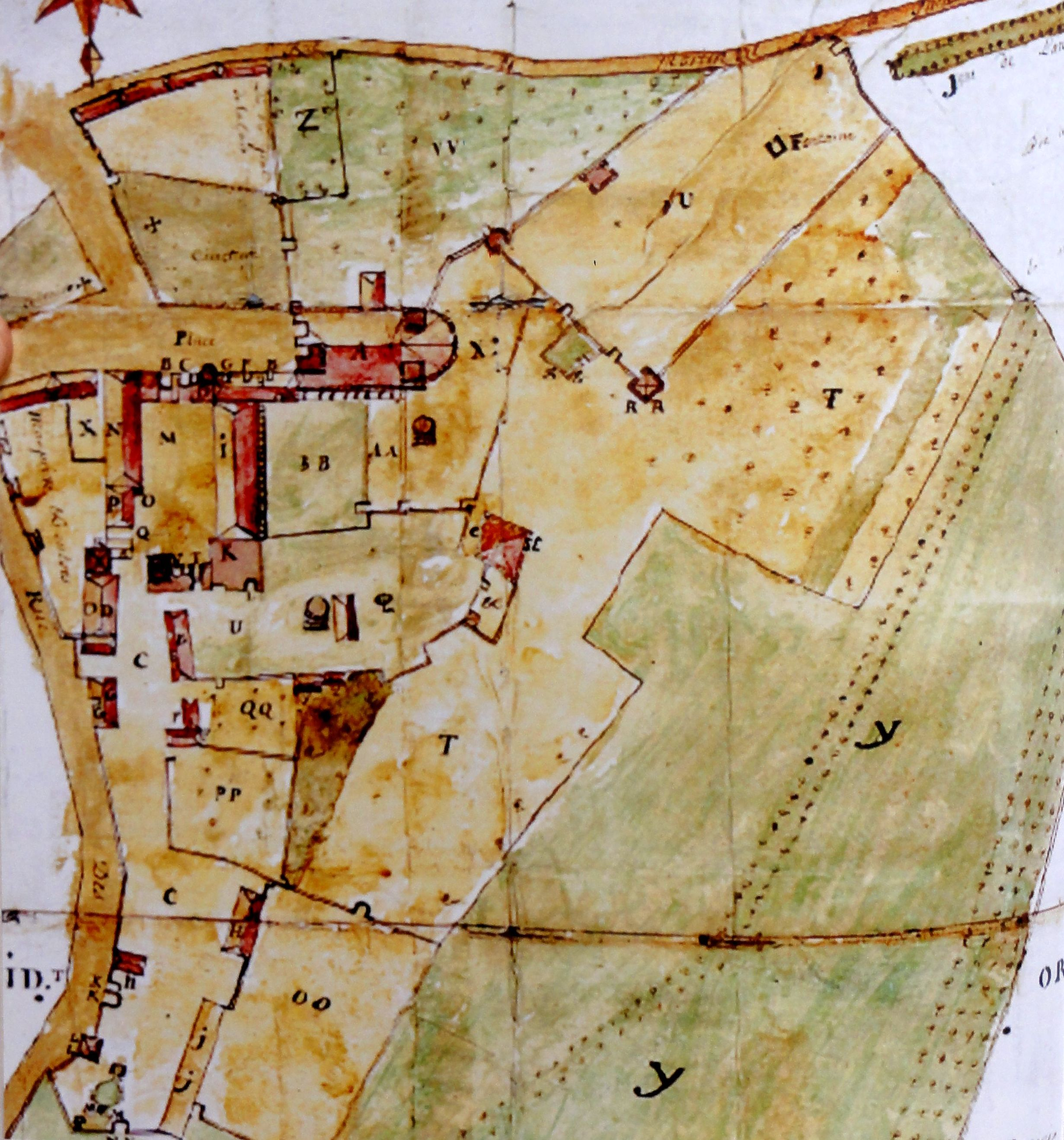 Plan de l'ancienne abbaye dressé après le départ des religieuses, entre 1752 et 1765. Légende : A - église avec au sud les vestiges de la galerie nord du cloitre ; AA - bâtiment conventuel comportant la salle du chapitre, le réfectoire et la cuisine ; BB - emplacement du cloître ; GFE - bâtiment du XIIe siècle démoli pendant la seconde moitié du XIXe siècle ; BCD porterie avec parloir des marchands et logement du chirurgien (existe toujours en 2013) ; I - bâtiment conventuel, ayant contenu sans doute les anciens appartements des religieuses, transformé en bâtiment agricole (existe toujours en 2013) ; K - pavillon de l'abbesse (existe toujours en 2013) ; X - emplacement de l'ancienne hôtellerie ; croix sur le cimetière au nord du parvis de l'église - emplacement de l'église paroissiale Saint-Denis démolie en 1750.